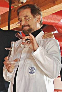 Luigi Garlaschelli, cropped by Alberto Villa's photo